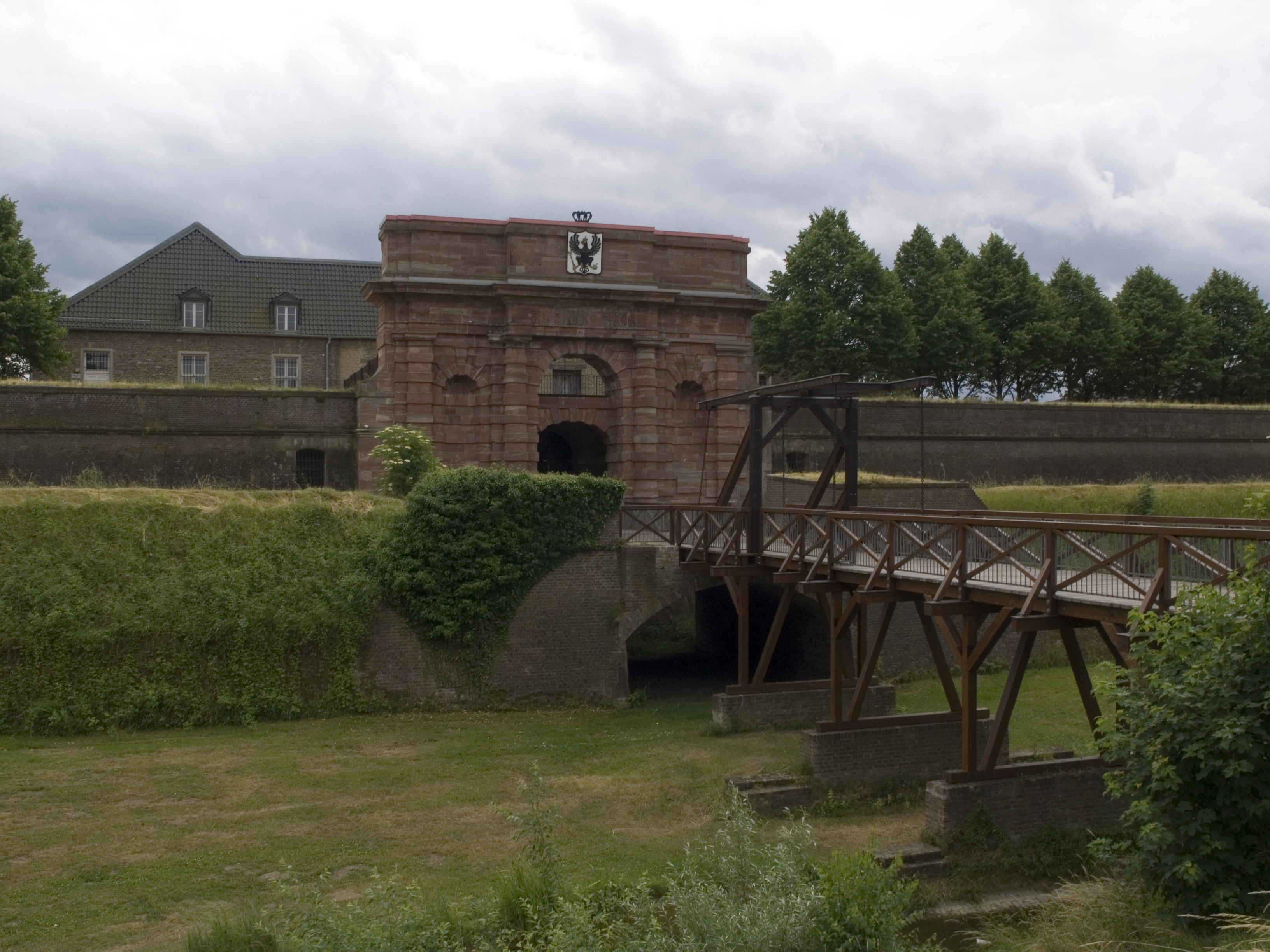 Северный Рейн-Вестфалия, Везель - Берлинские ворота